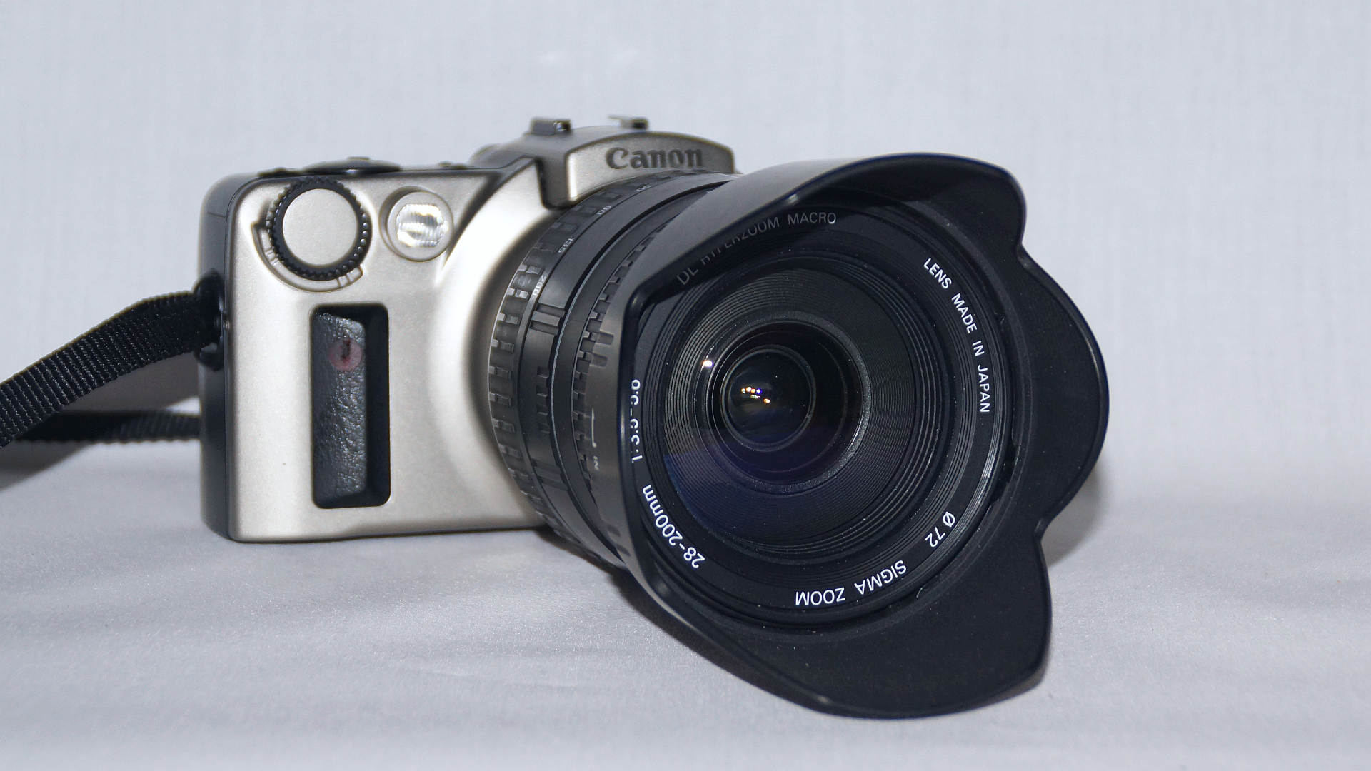 Canon EOS IX, aps-formatted, 30 and 1/4000 sec, with Sigma DL Hyperzoom Macro IF Innenfokussierung Asperical, 1:3.5-5.6/28-200mm, EF-mount. Foto Wolfgang Pehlemann DSC04873